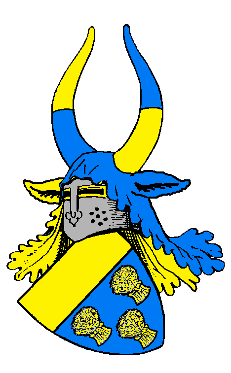 Stammwappen der Frey von Dern; Ortsadel von Dehrn im Lahntal (Limburger Becken).